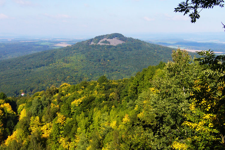 Sicht vom Thüringer Blick auf den Kleinen Gleichberg